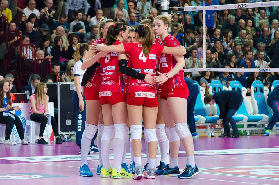 Vedi titolo